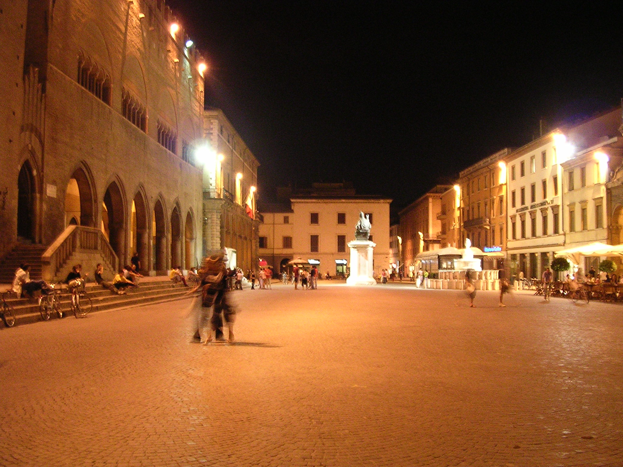 Piazza Cavour a Rimini di notte